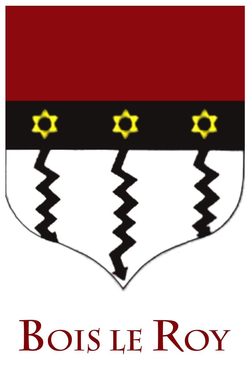 Blason de Bois le Roy